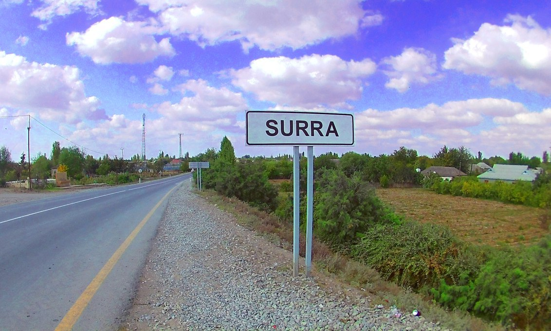 Surra kəndi Sabirabadda yerləşir. Bu, kəndin giriş lövhəsidir.